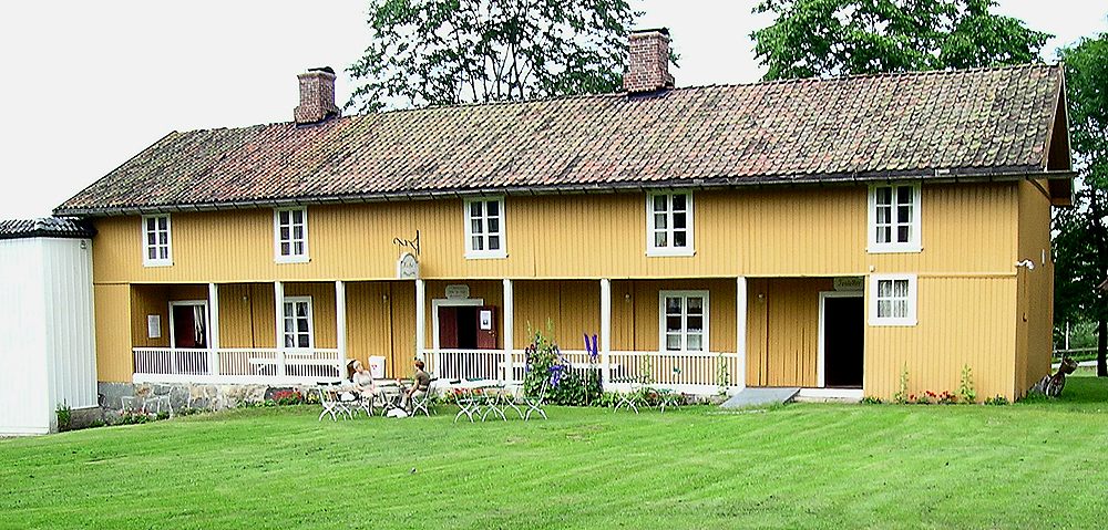 Fossesholm nordfløy (bryggerhus). 1700-tallet. Freda 1923.